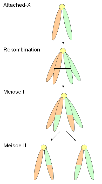 Markerverteilung durch Rekombination im Attached-X-Chromosom